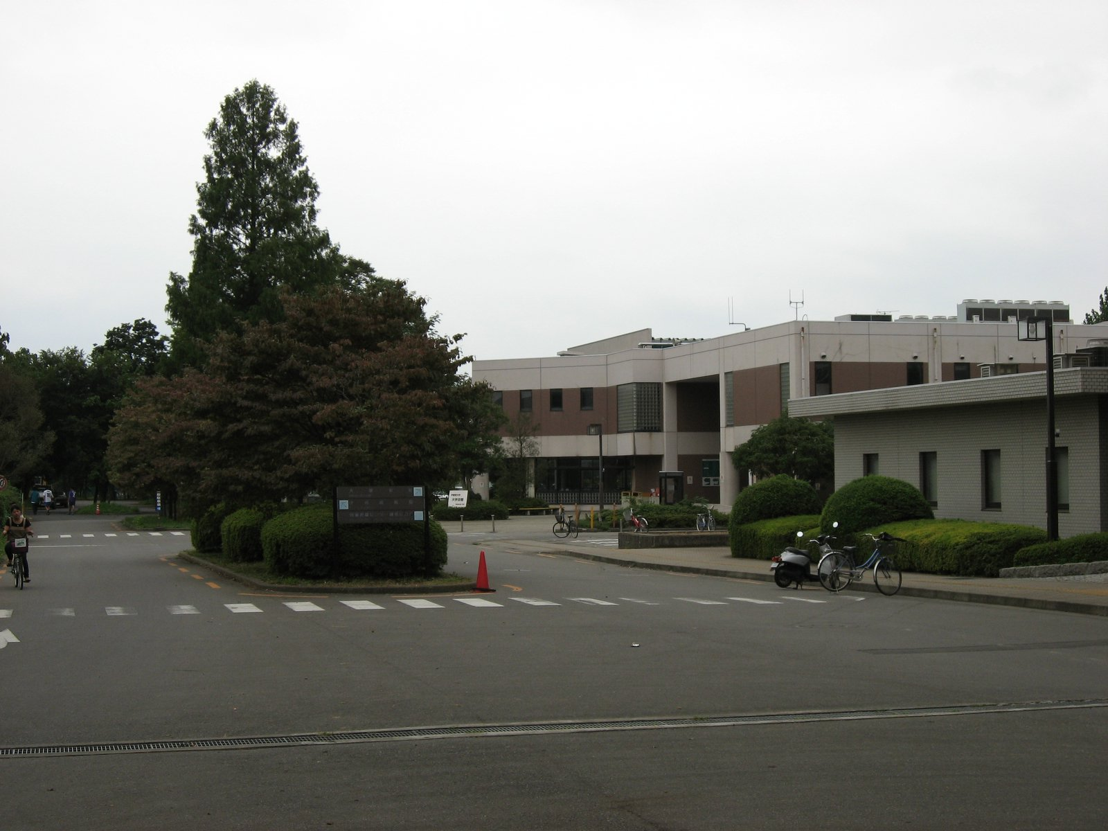 宇都宮大学の生協